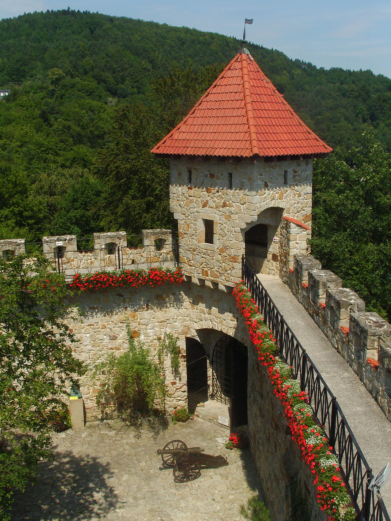 Zamek Tropsztyn w Małopolsce